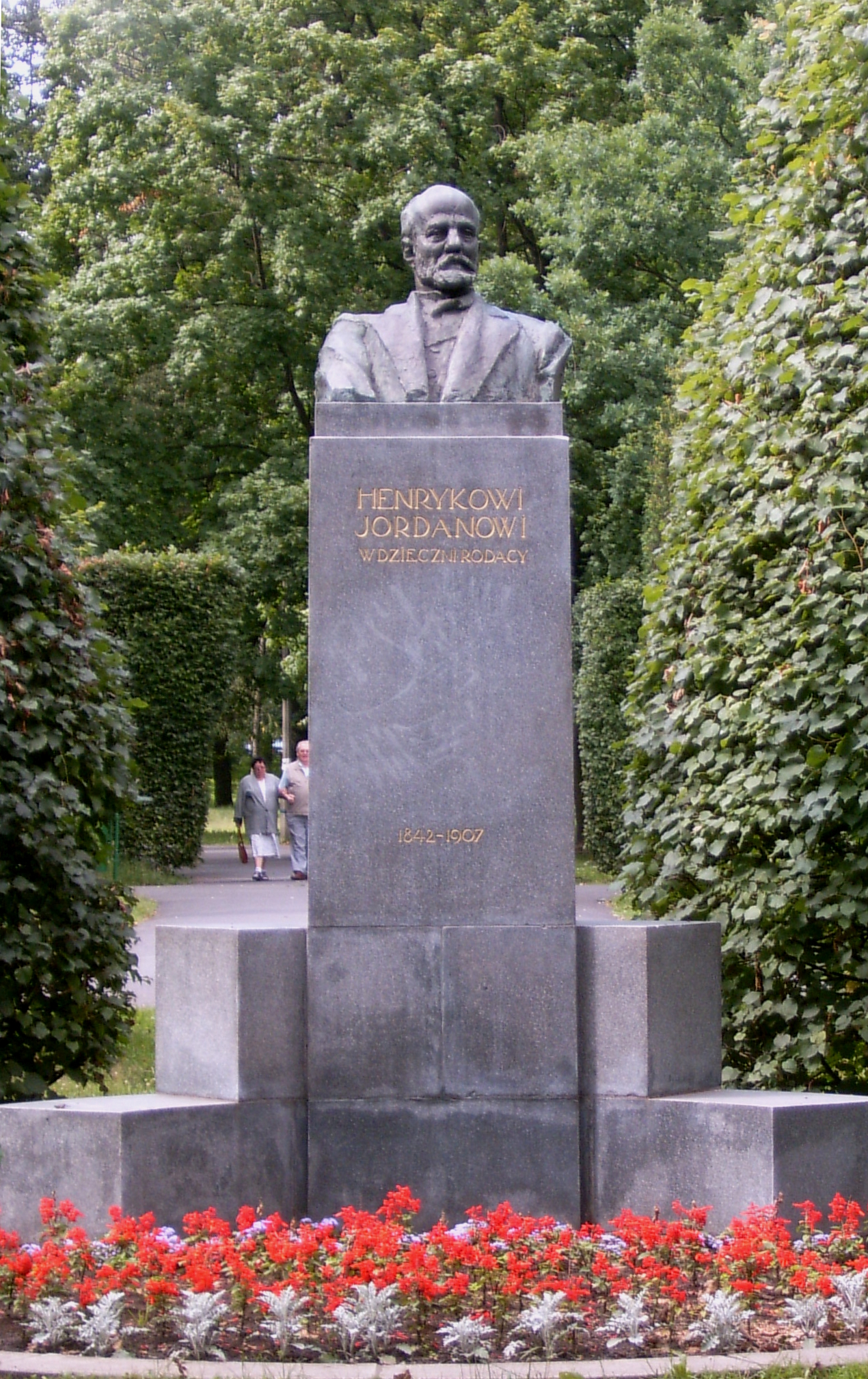 Kraków, Poland